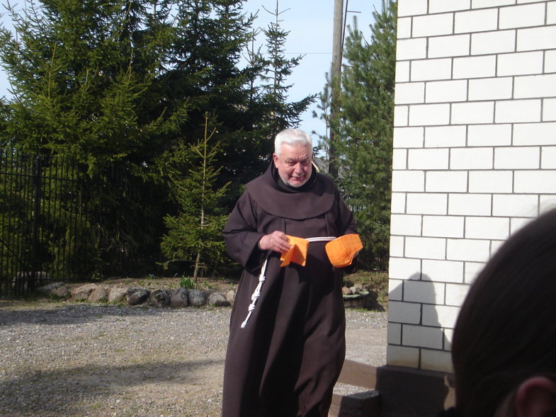 Katoliku preester isa ksjondz Augustyn Loska. Katoliku kirik Eestis